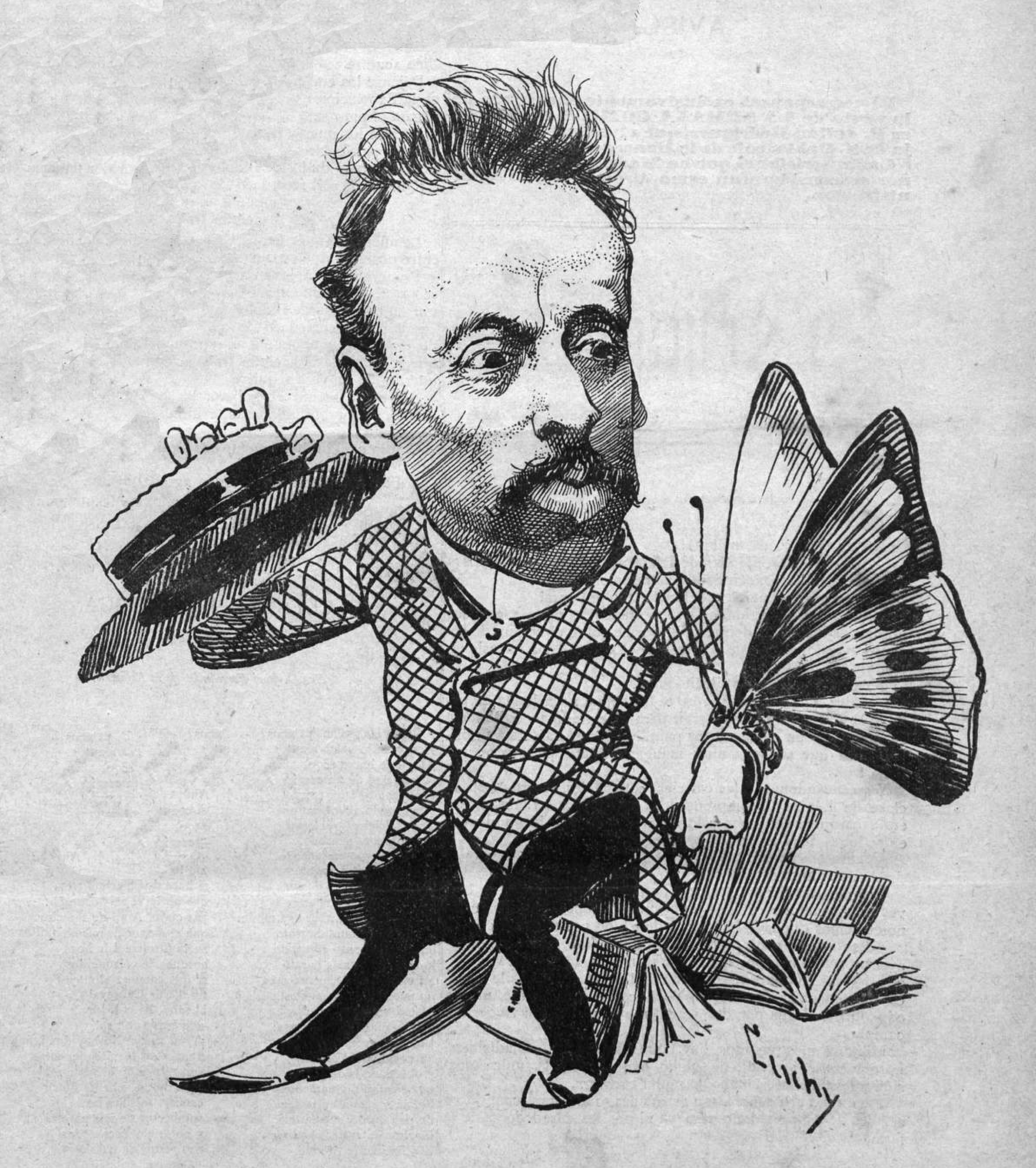 Narciso Oller.